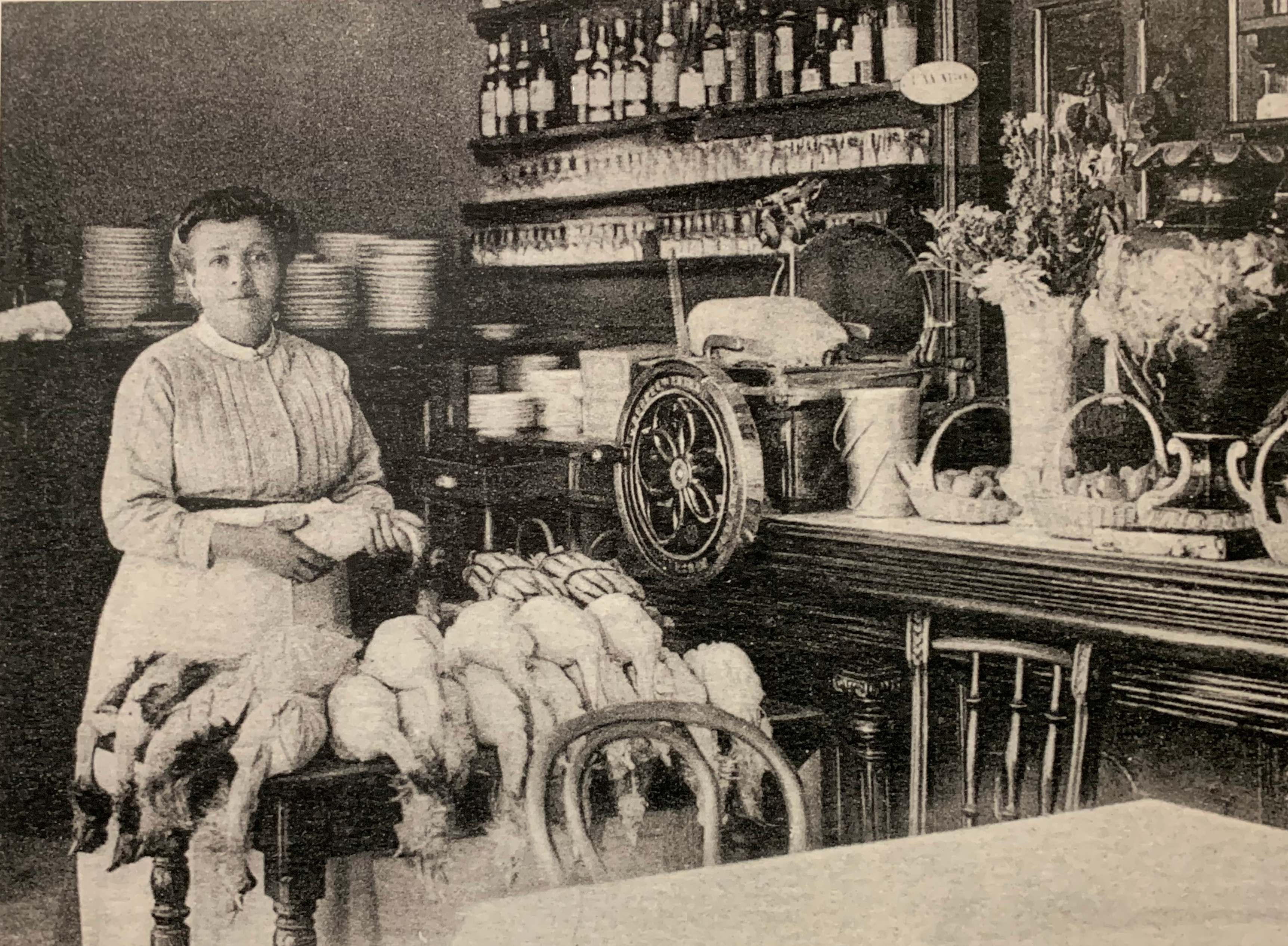 Françoise Fayolle préparant ses poulardes demi-deuil dans son restaurant du 73 rue Duquesne (Lyon) à la fin du XIXe. Image ancienne photographiée aux Halles Paul Bocuse à Lyon.